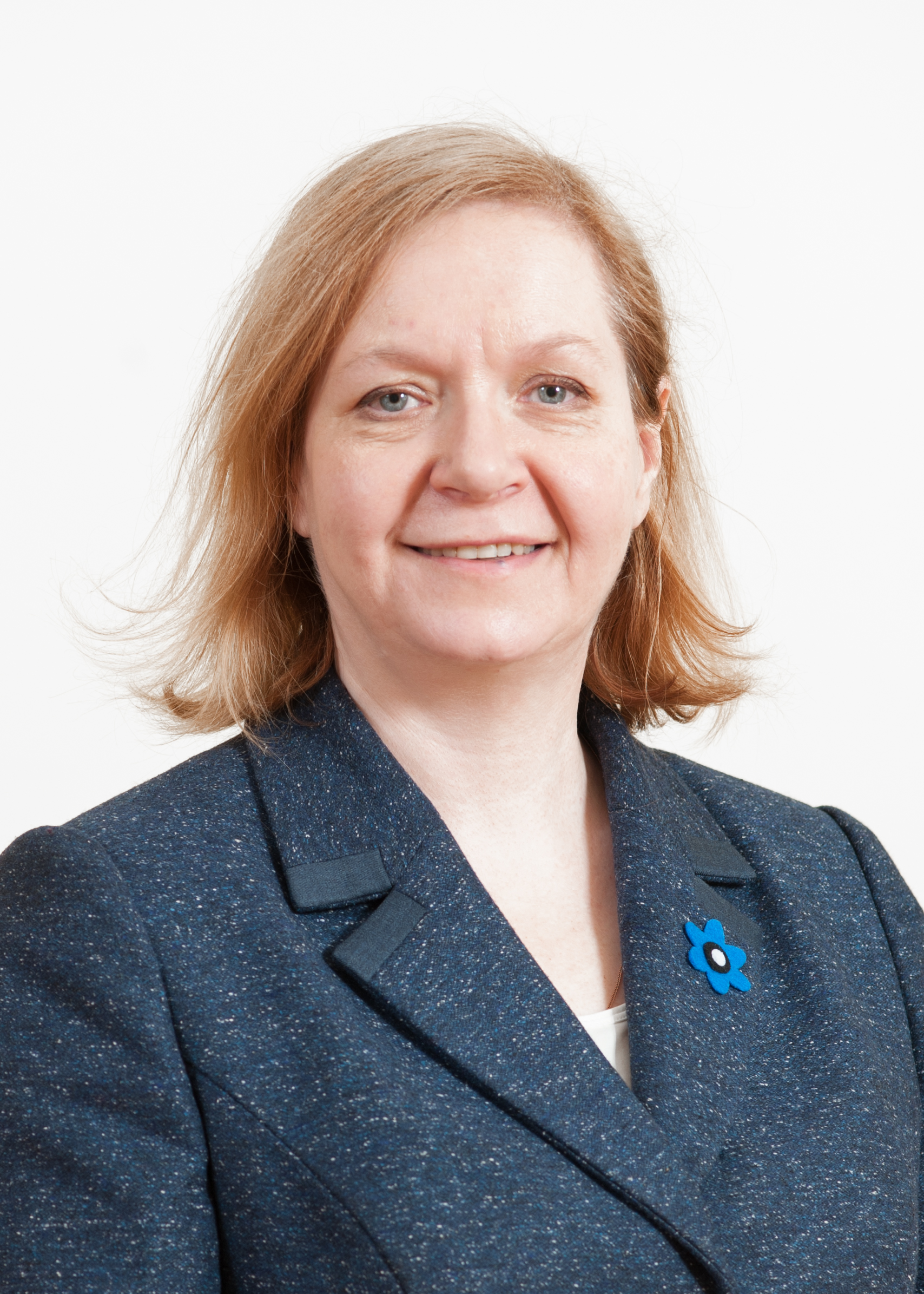 Maris Lauri